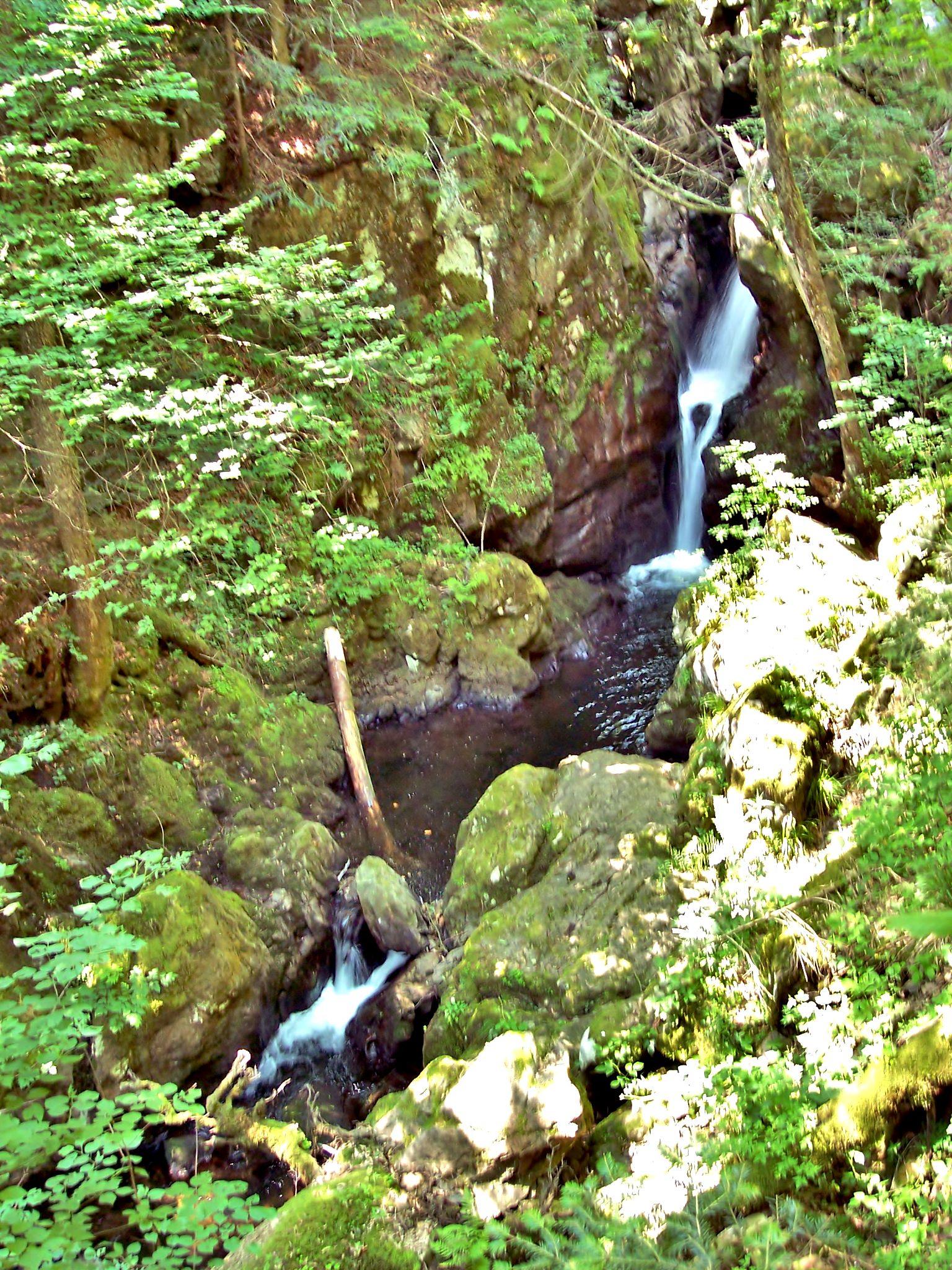 La vertigineuse gorge d'Alfeld. Entre le lac d'Alfeld et le lac de Séwen. Haut-Rhin